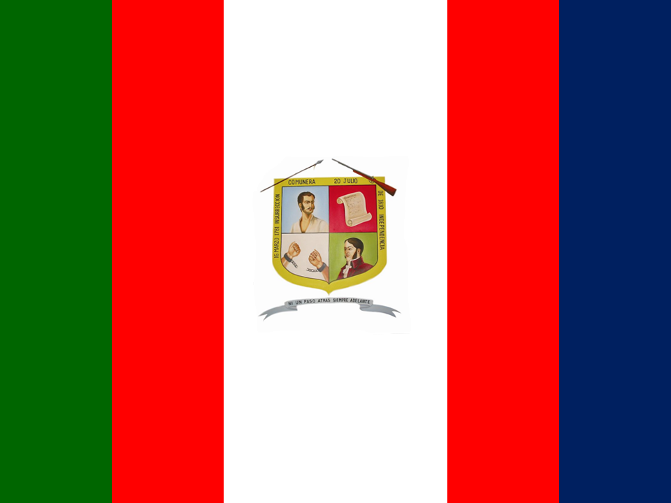 Bandera del Municipio de Charalá (Colombia)